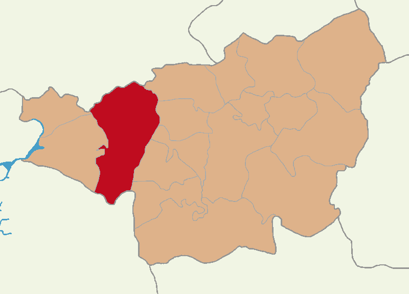 Ergani ilçesinin konumu